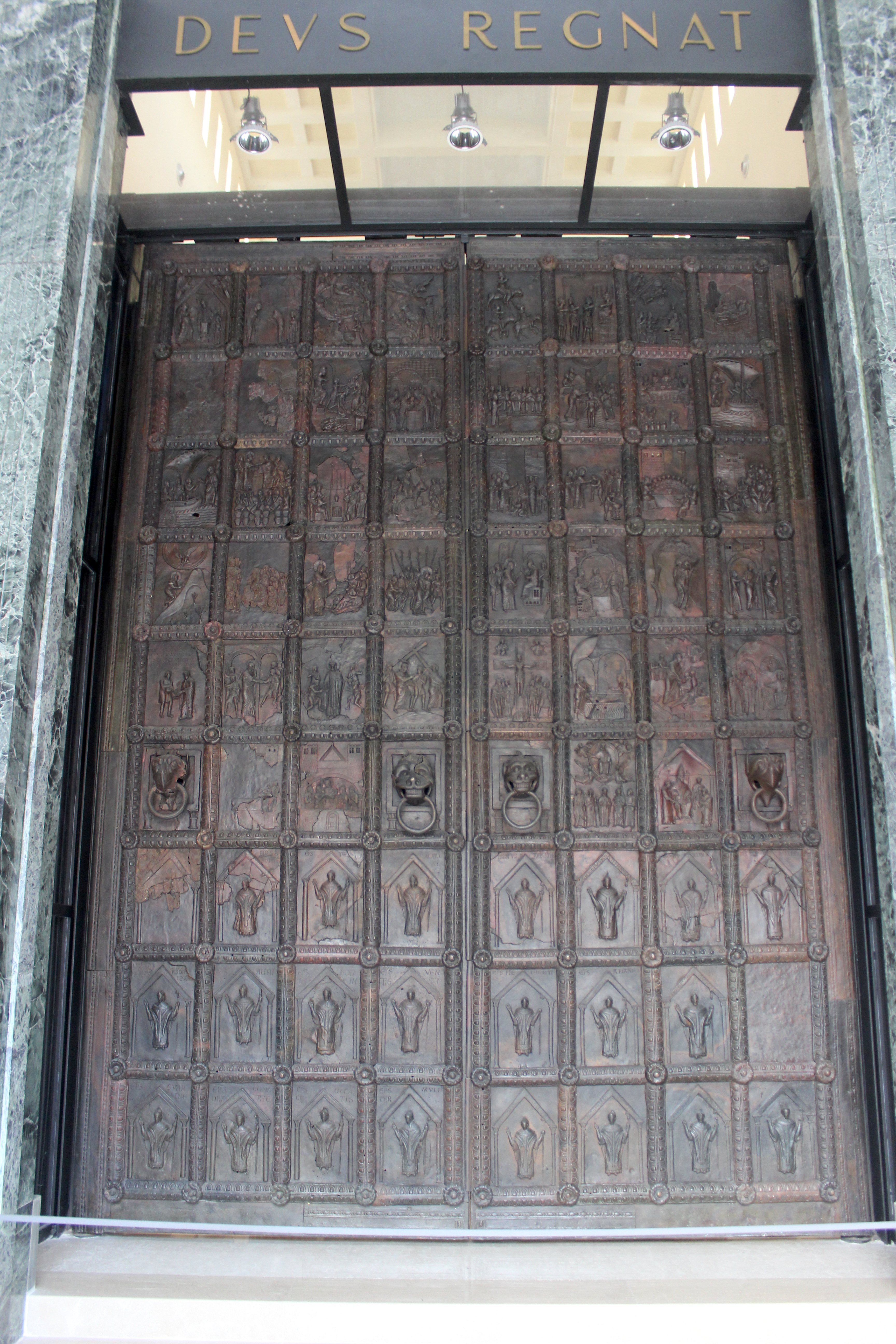 Benevento. Catedral, puerta de bronce románica, atribuida (al menos en parte) a Oderisio da Benevento. s. XII.